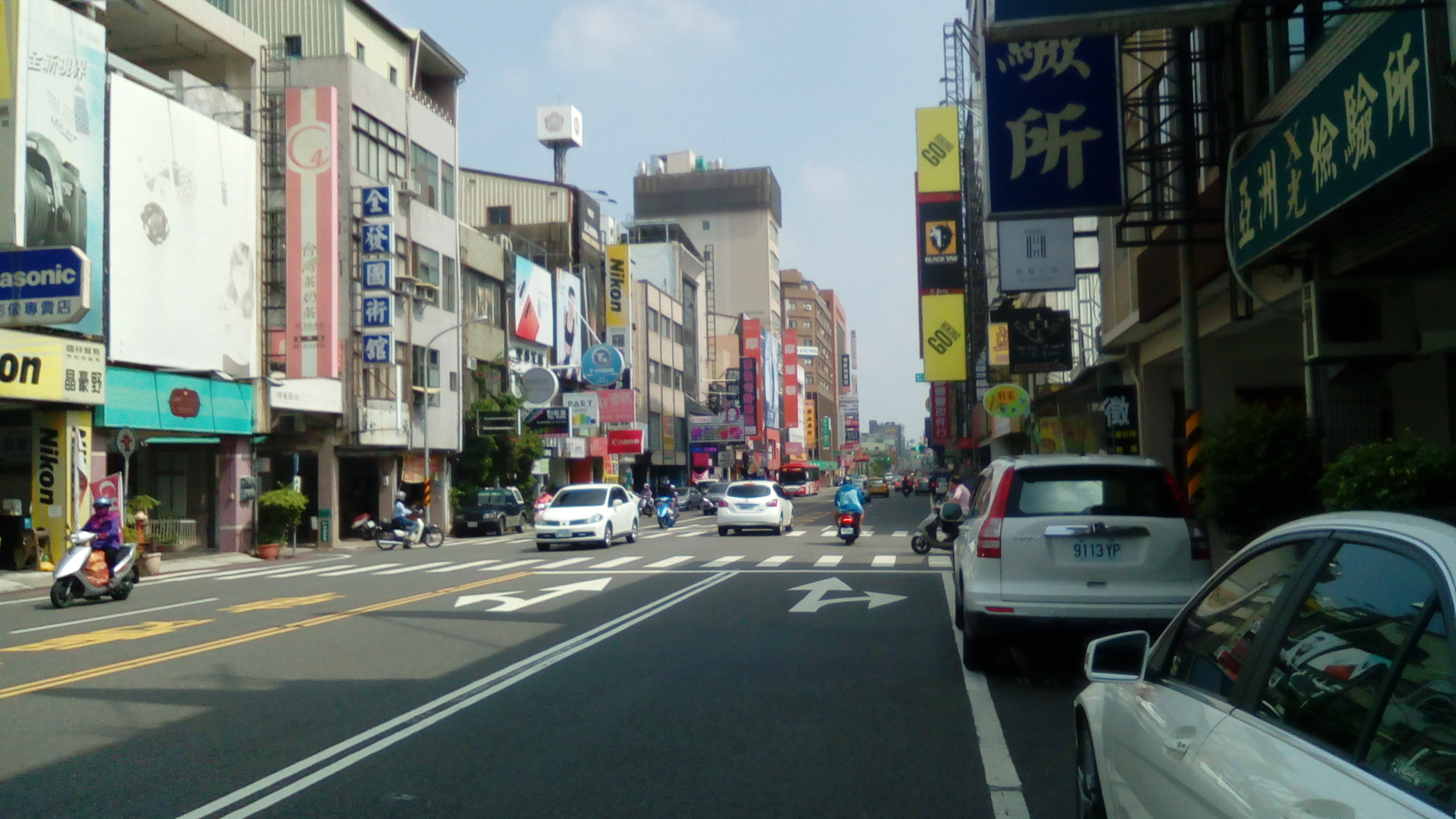 大同路一段